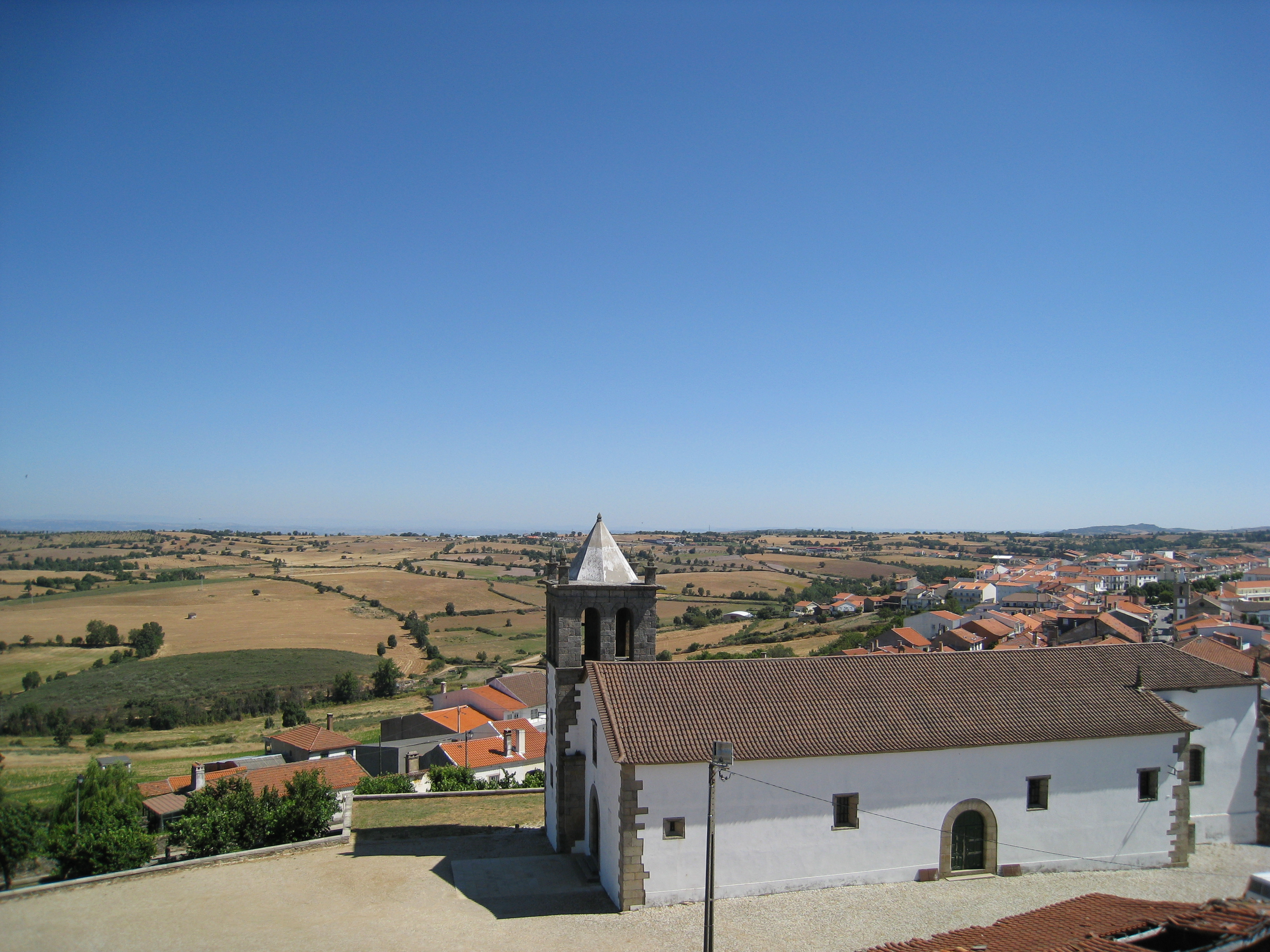 Mogadouro_6